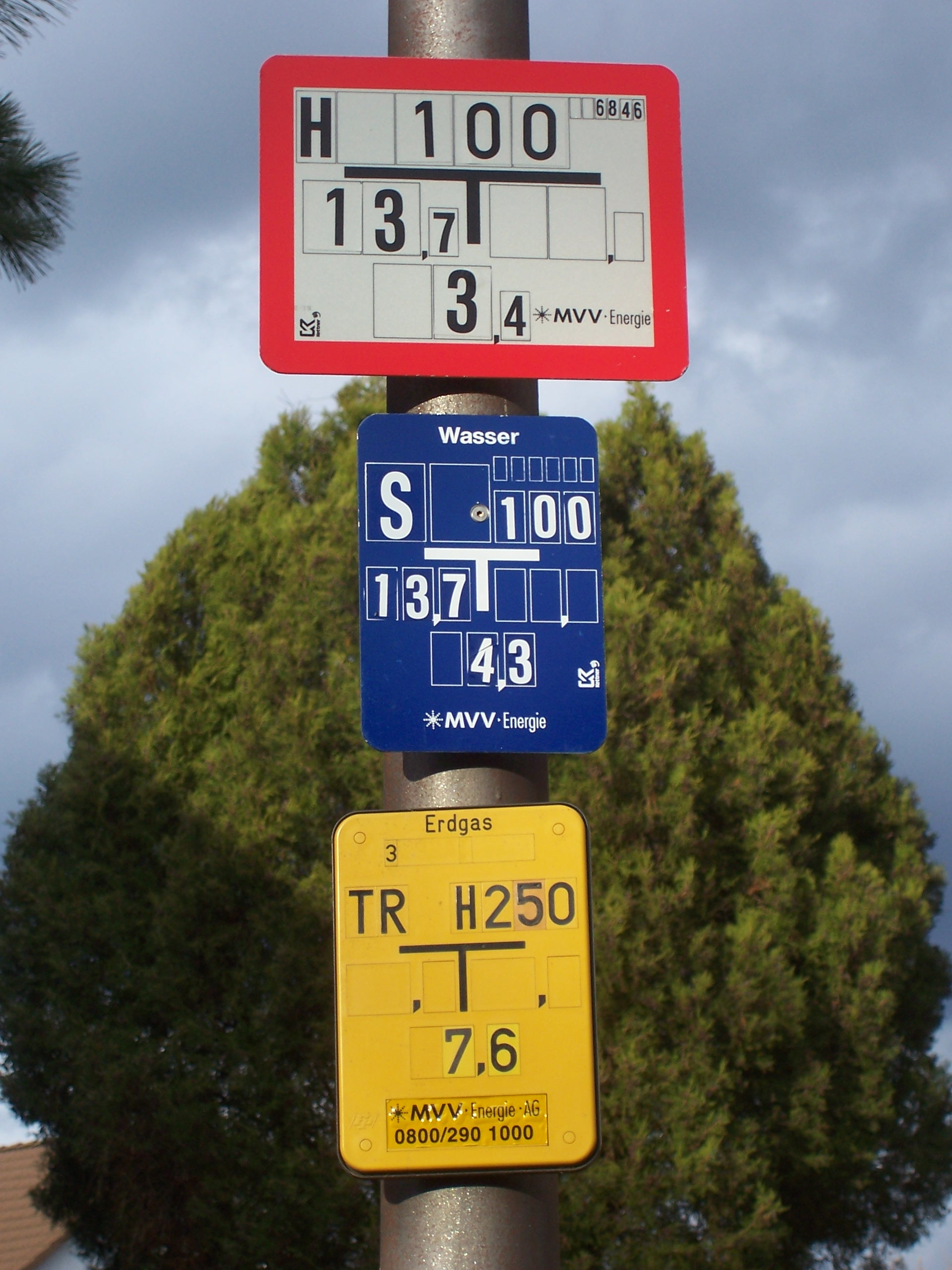 Ein Mast mit Hinweisschilder für einen Unterflurhydranten, Wasserschieber und eine Armatur einer Erdgasleitung